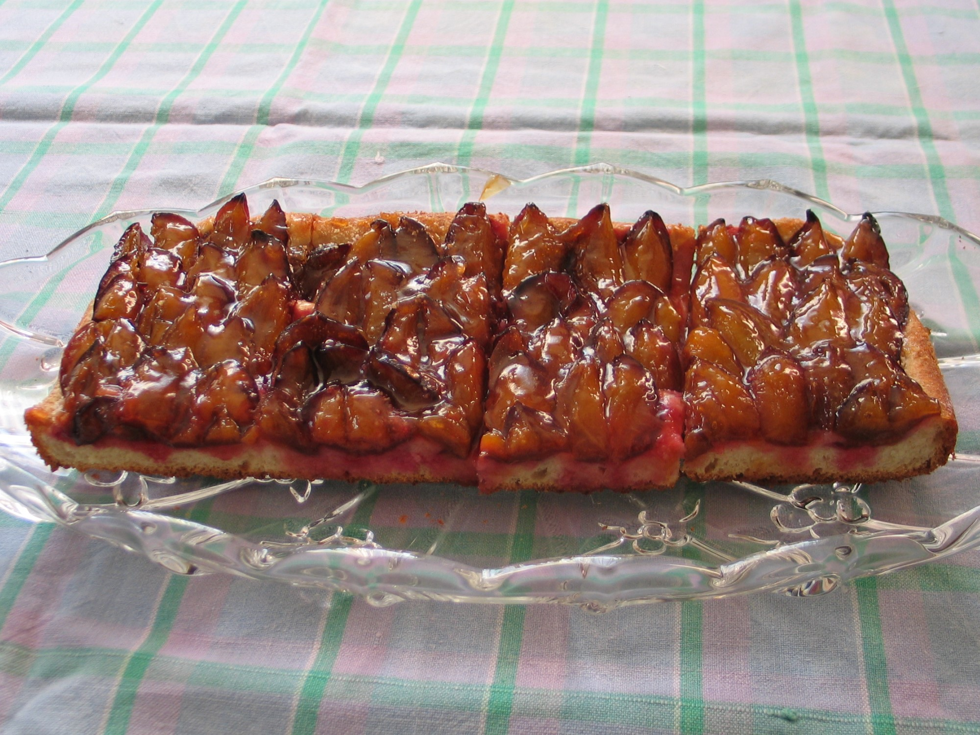 Augsburger Zwetschgendatschi